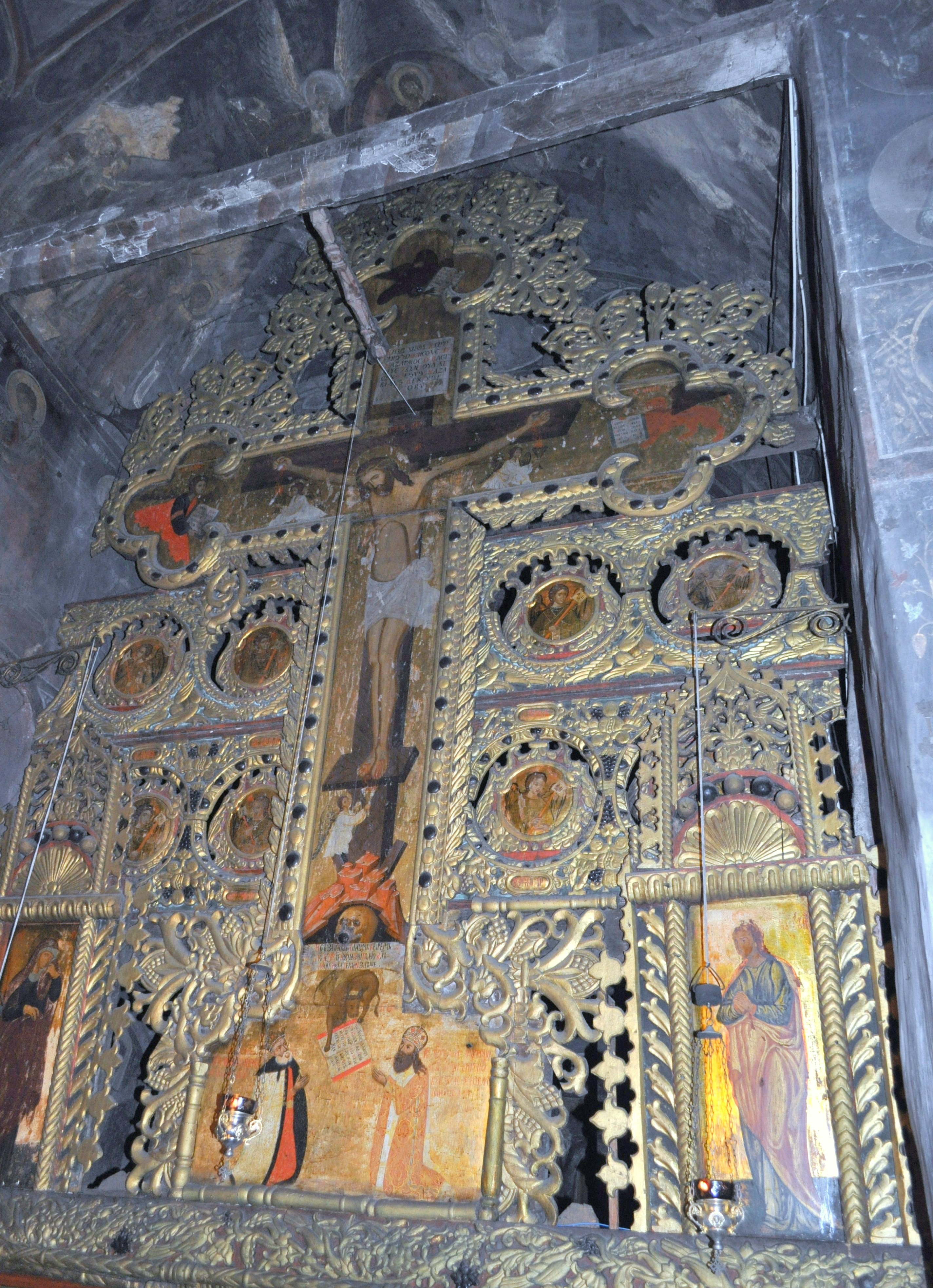 Ansamblul schitului Crasna, județul Gorj